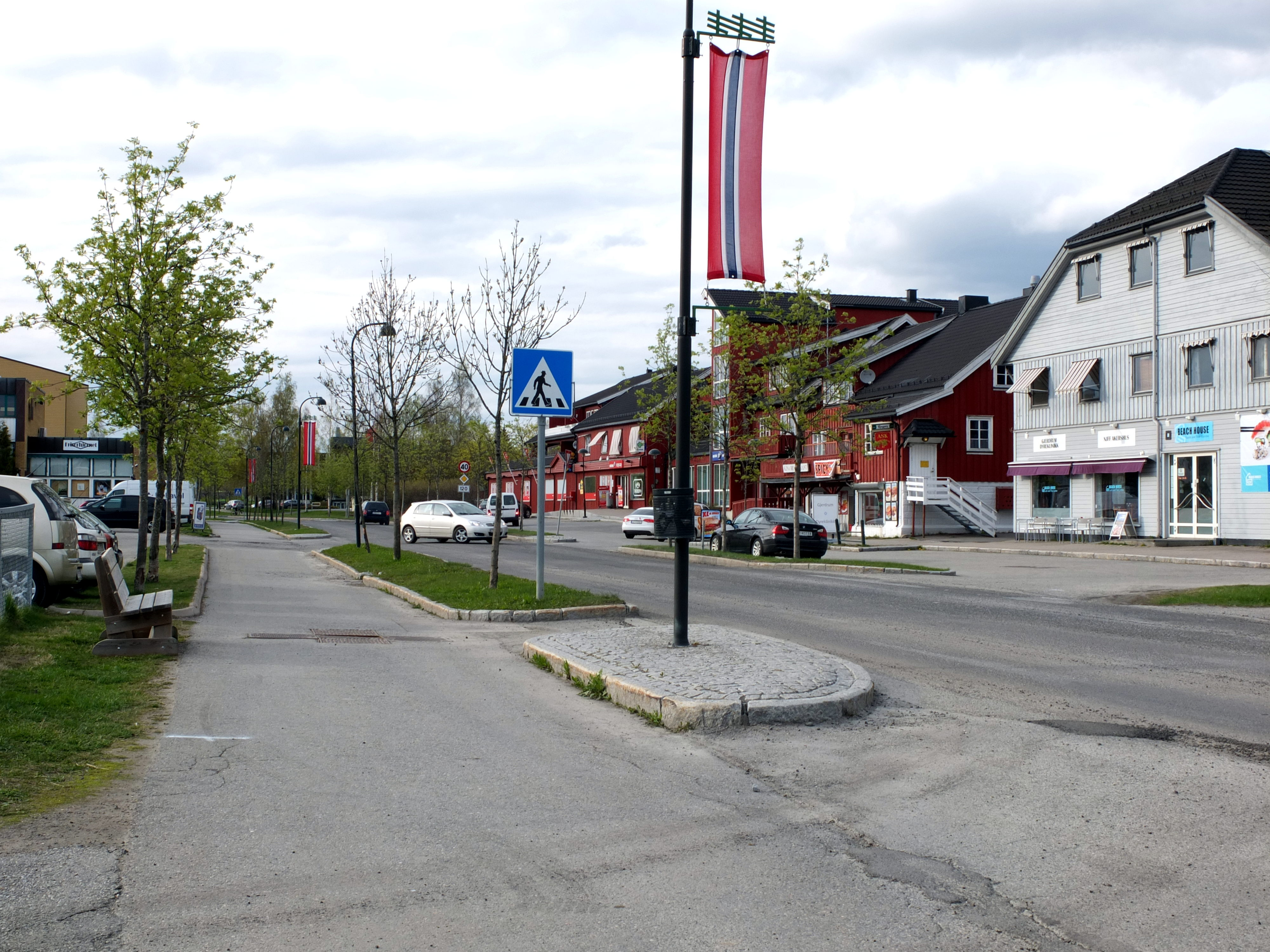 Ask i Gjerdrum